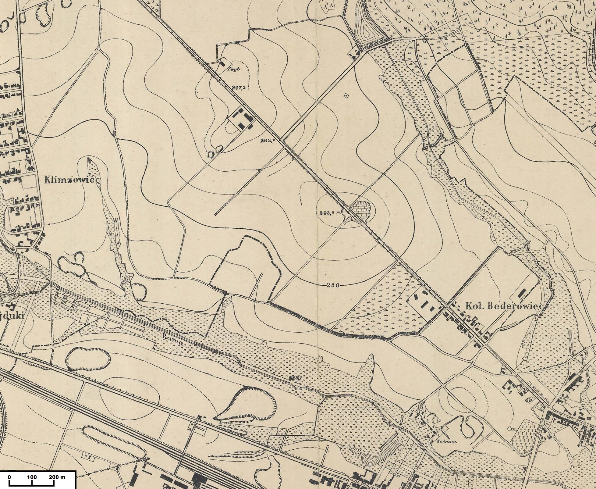 Fragment "Planu miasta Wielkich Katowic", przedstawiający obszar obecnego Osiedla Tysiąclecia, 1926 r., skala 1:10.000, oprac. Haręźlak, Krasnodębski, Steller